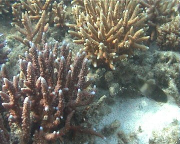 Koralle mit Wachstumsspitzen selbst aufgenommen